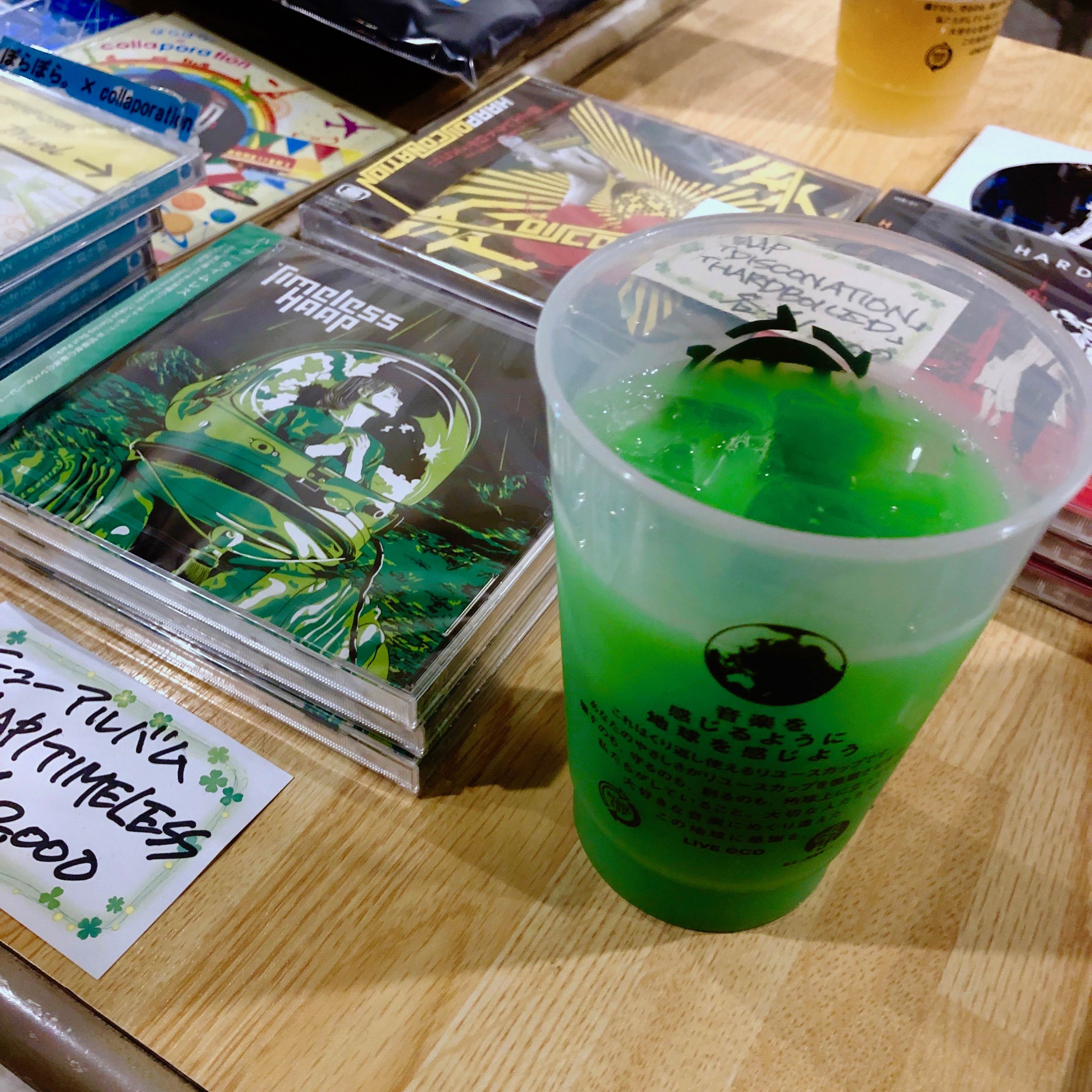 HAAP考案のカクテル